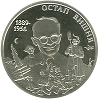 Остап Вишня реверс